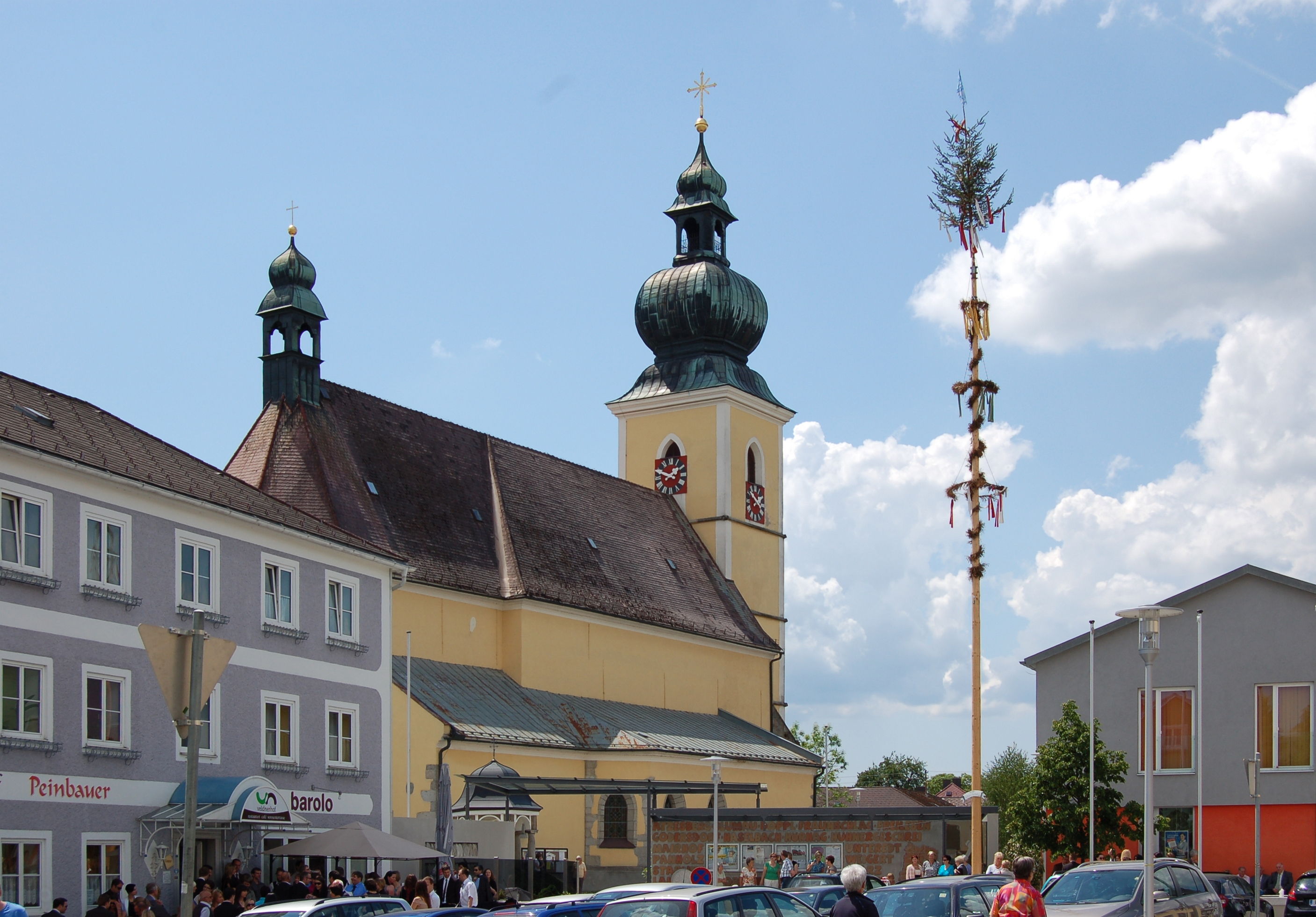 Die denkmalgeschützte Pfarrkirche in Altenfelden in Oberösterreich (Bezirk Rohrbach).